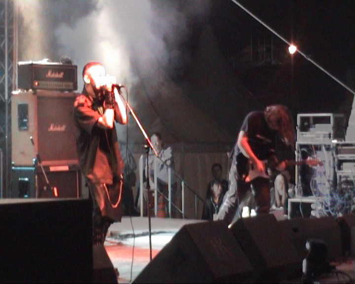 dreDDup uživo na Exit 2009 festivalu.